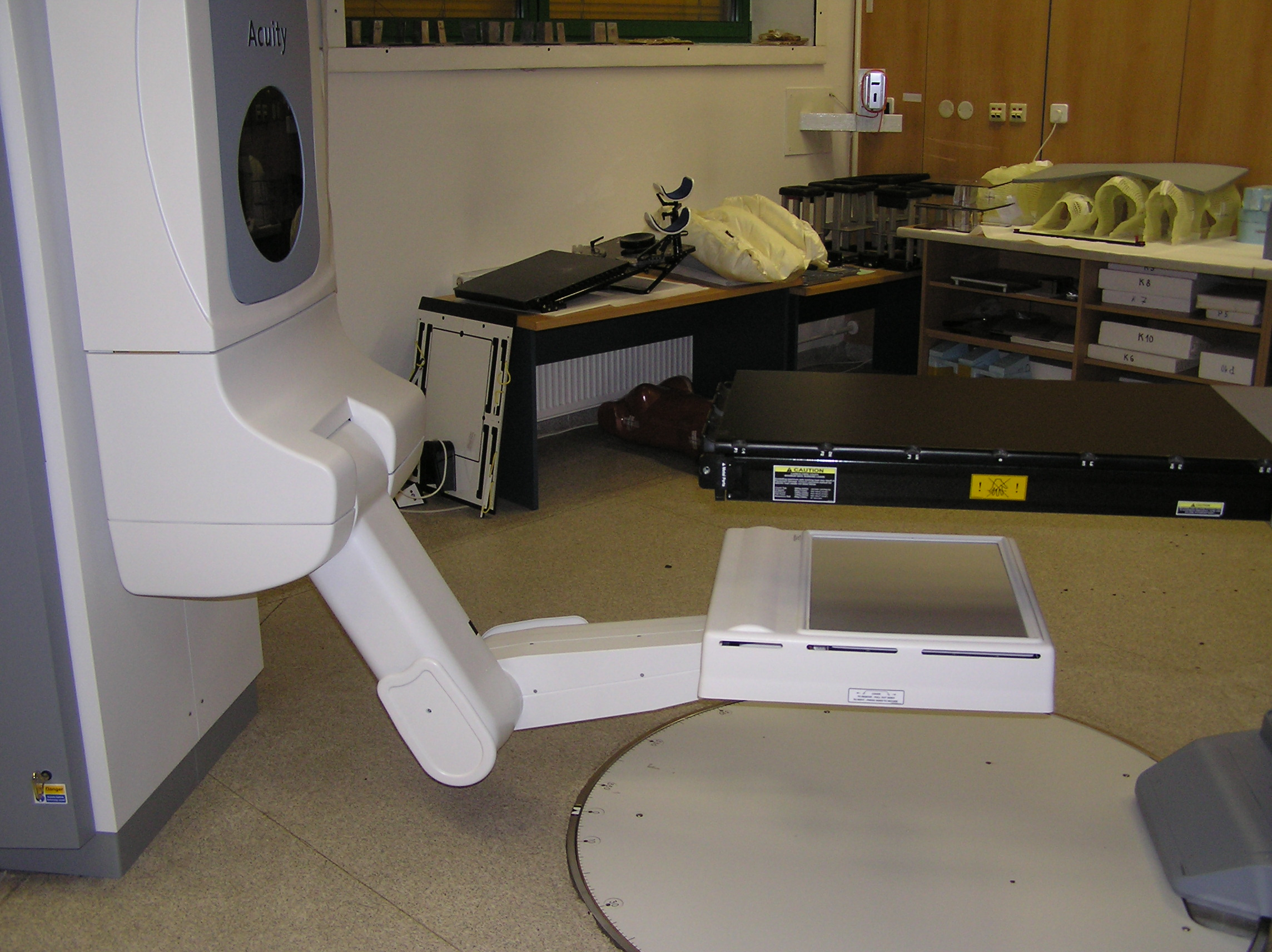 Digitální rentgen u simulátoru lineárního urychlovače. FN Motol, Prague, 2006-12-01